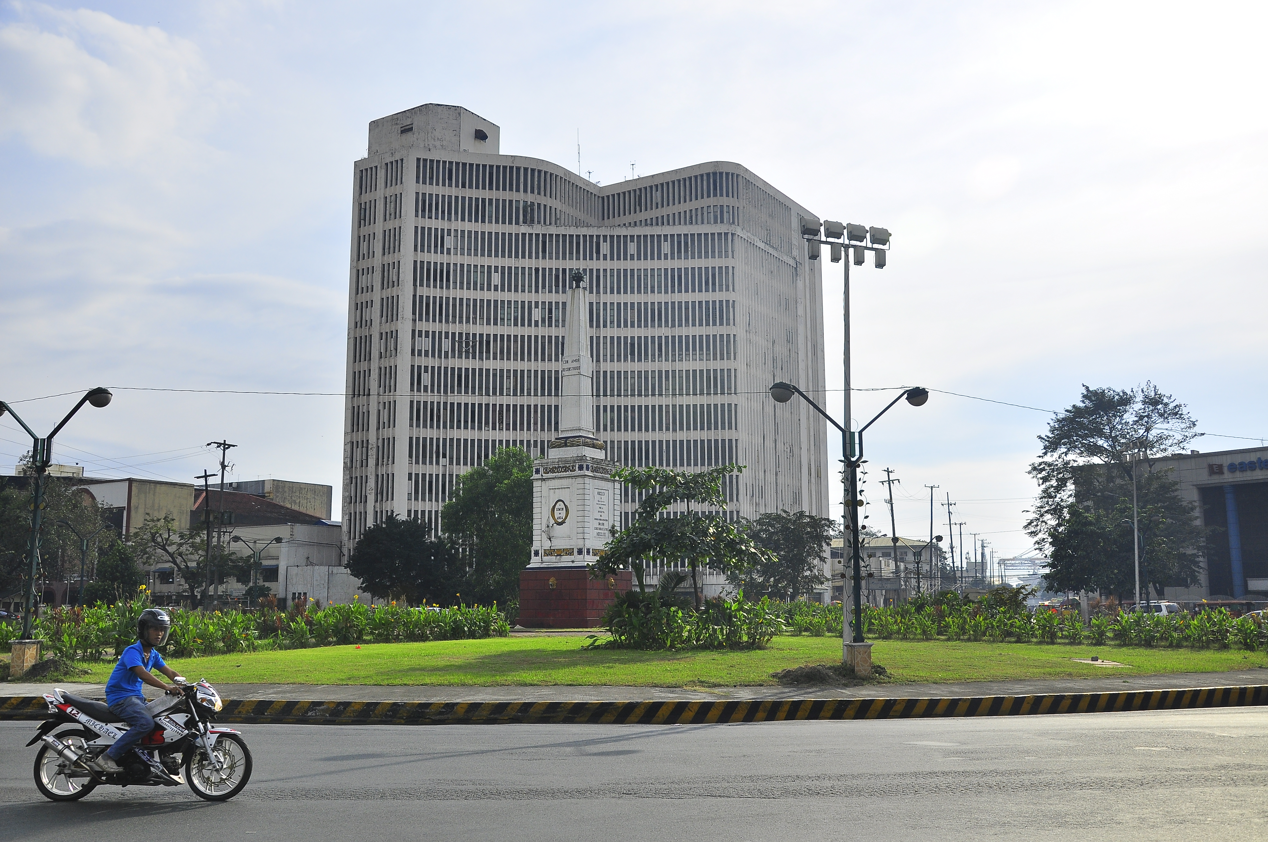 Anda Circle in Manila, Philippines